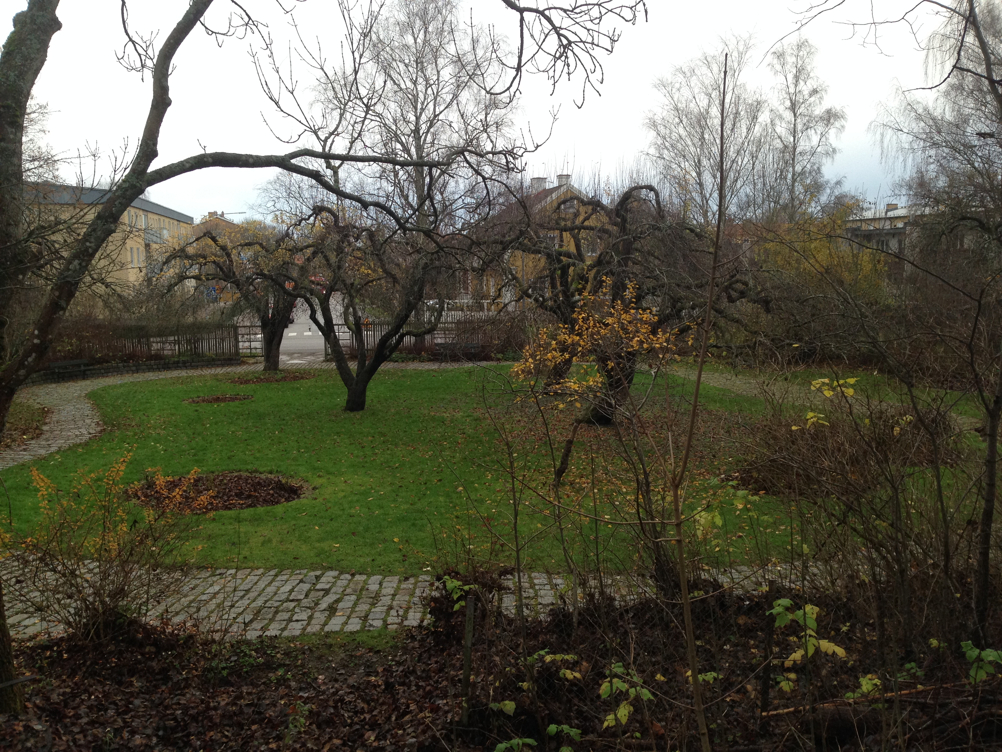 Den lilla parken Stabbylyckan, november 2014